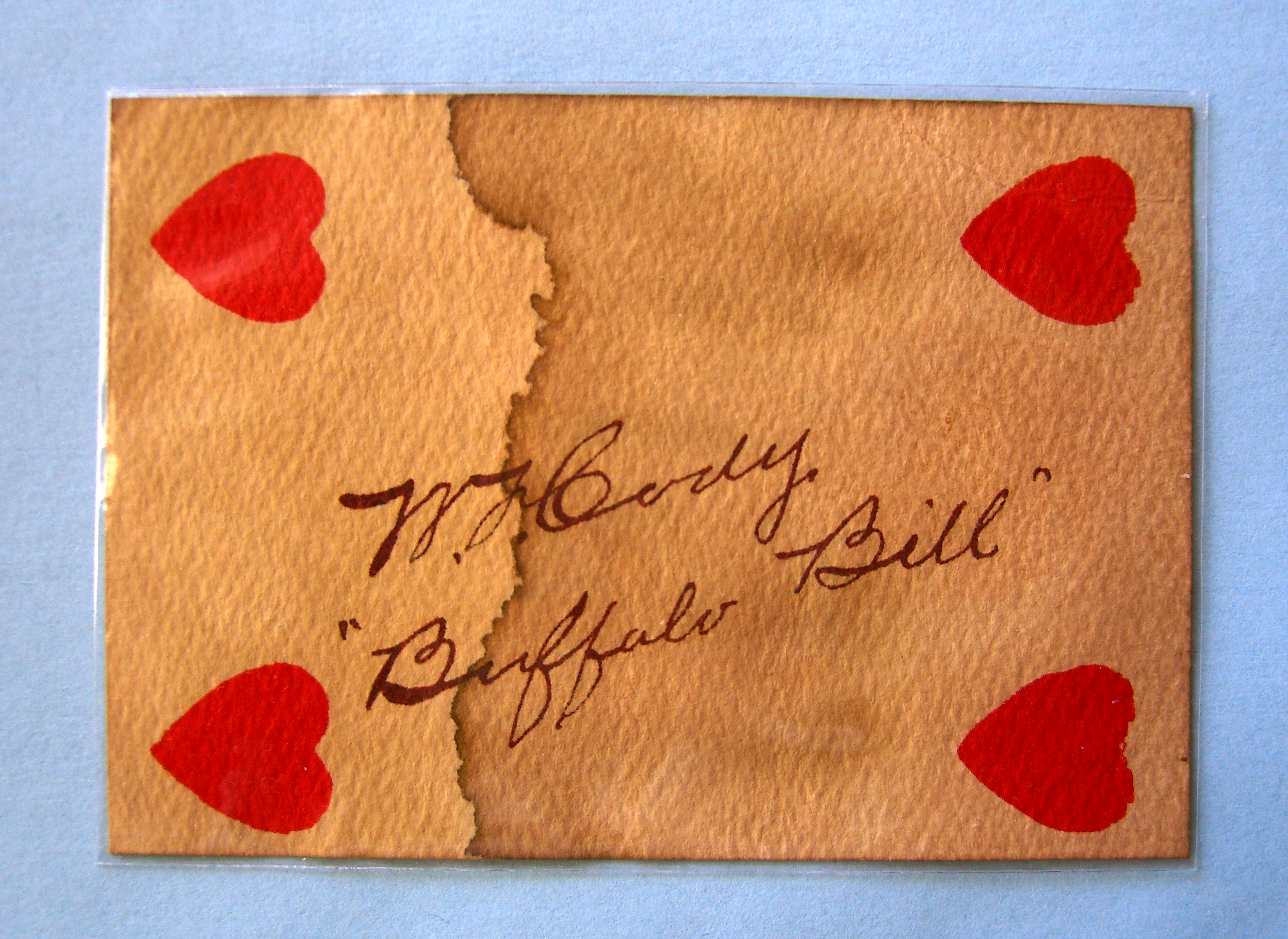 Carta de baraja que solían firmar los personajes famosos que actuaban en el Buffalo Bill's Wild West Show